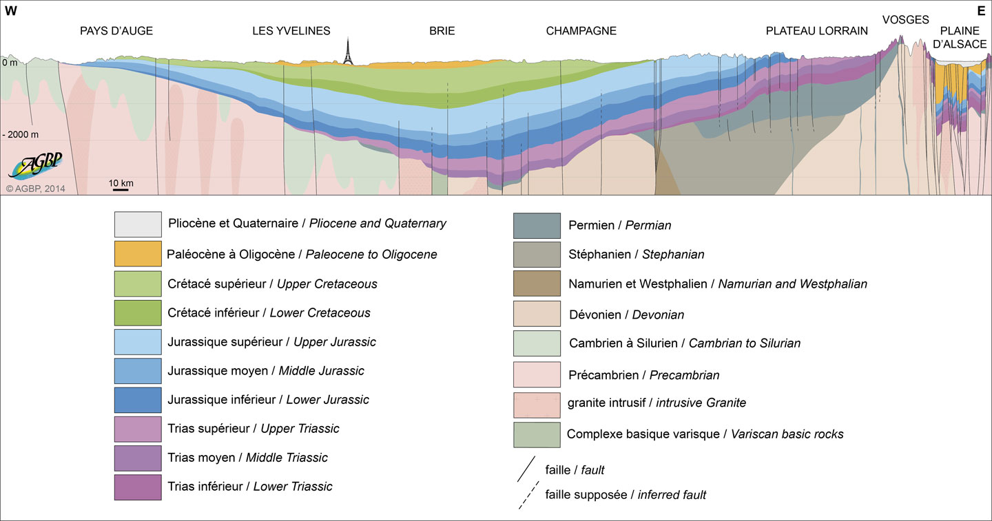 Coupe géologique du Bassin parisien AGBP 2014